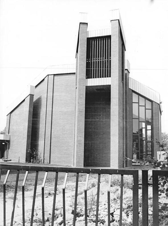 ADN-ZB-Junge-26.9.1984-rü.-Berlin: Neue Kirche in der DDR-Hauptstadt-Außenansicht der römisch-katholischen Pfarrkirche "Maria, Königin des Friedens" im Wohngebiet Biesdorf-Nord, die im Frühjahr 1984 eingeweiht wurde. "